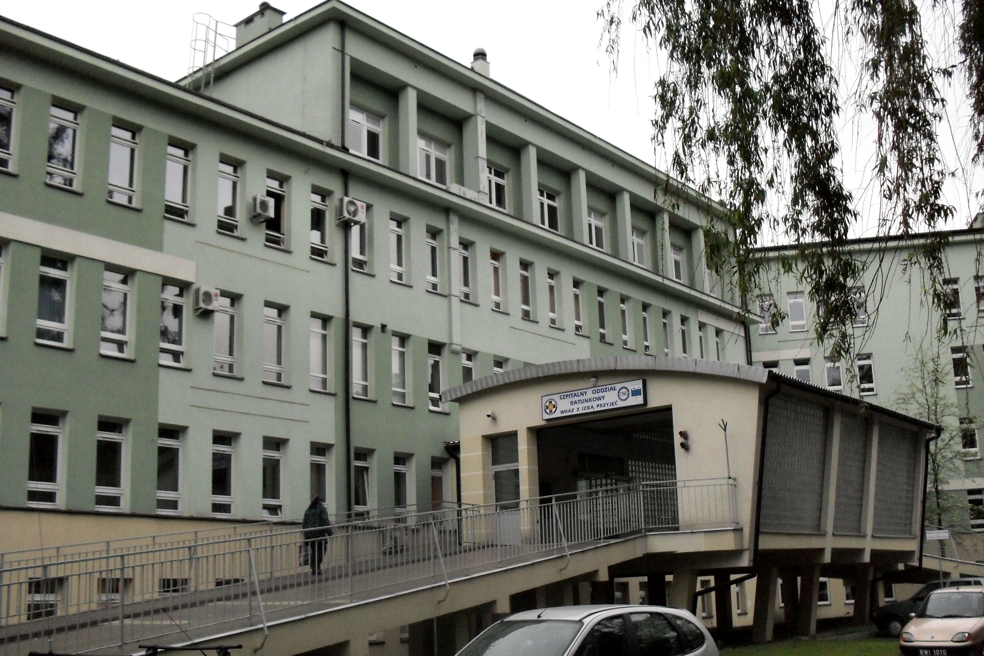 Szpital Specjalistyczny w Jaśle